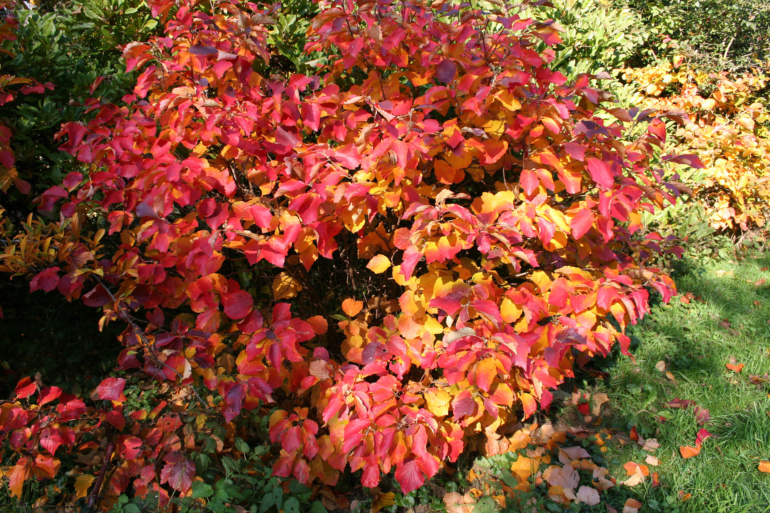 Fothergilla major Année de plantation : 1979 Position exacte : Arboretum Robert Lenoir (S48B) - Rendeux (Belgique).